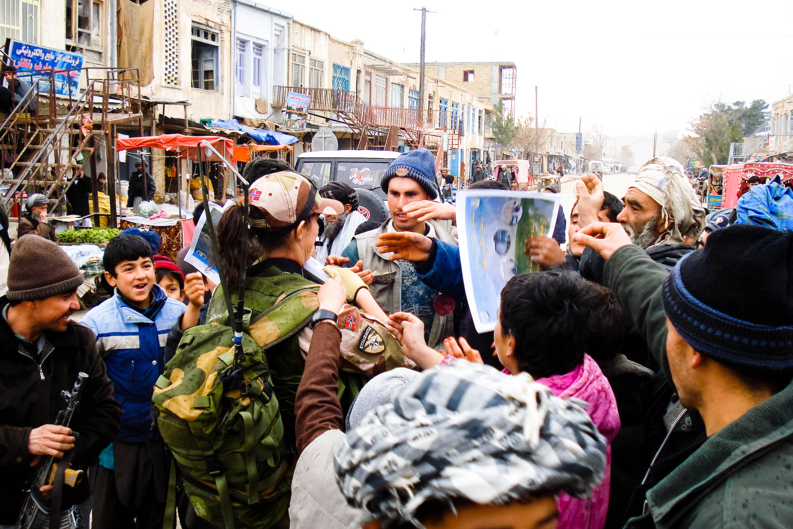 ファーリヤーブ州マイーマナの人々